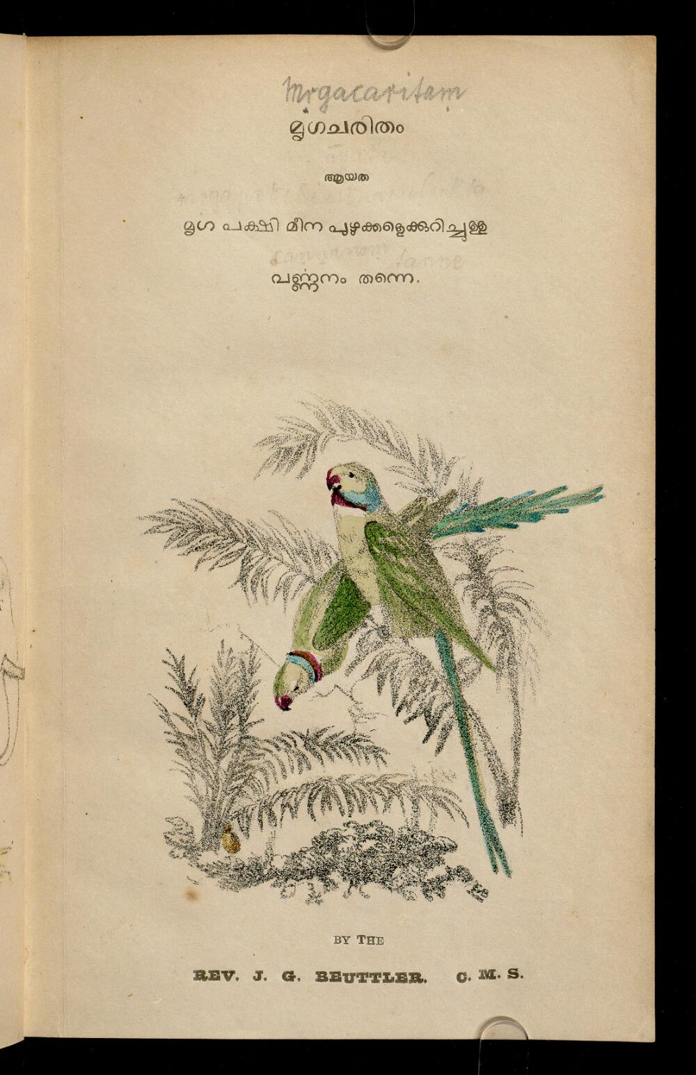 പേര്: മൃഗചരിതം – ആയത മൃഗ പക്ഷി മീന പുഴുക്കളെക്കുറിച്ചുള്ള വൎണ്ണനം തന്നെ.